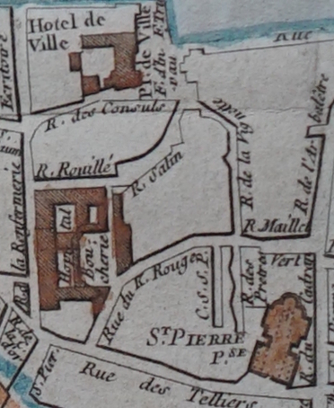 dessin de povillon-pierard dans un manuscrit de sa main.